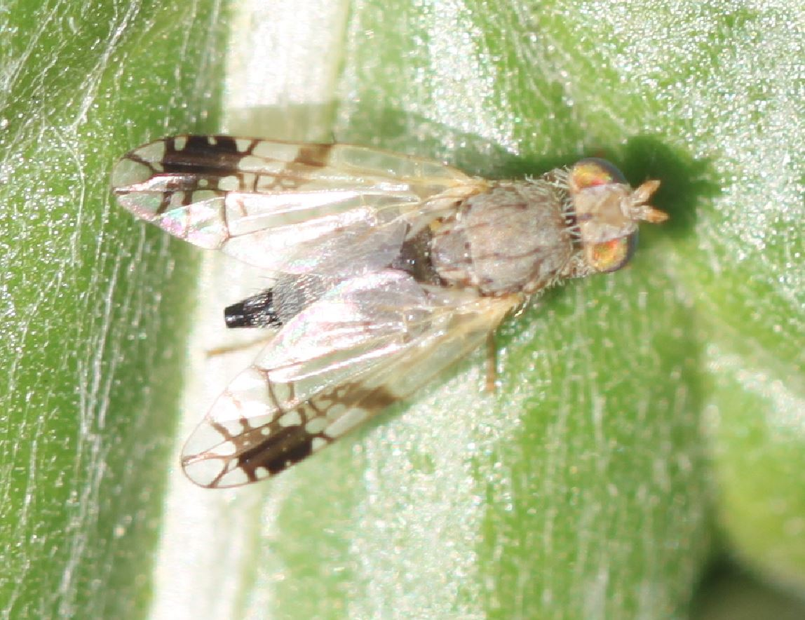 Bohrfliege Tephritis cometa am 13. Mai 2019 in Walldorf/Baden